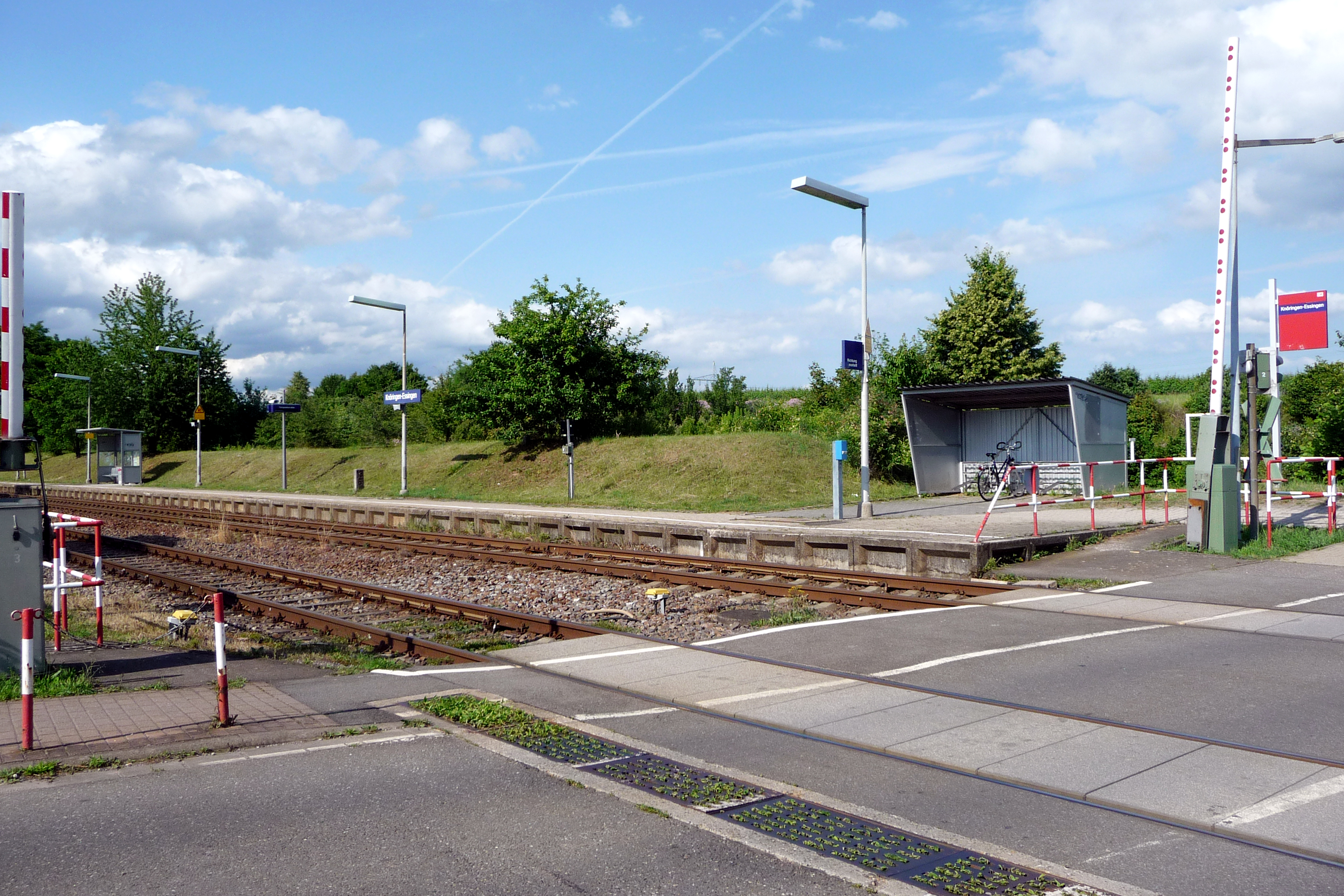 Bahnübergang bei Knöringen. Knöringen ist eine Ortsgemeinde im Landkreis Südliche Weinstraße in Rheinland-Pfalz.